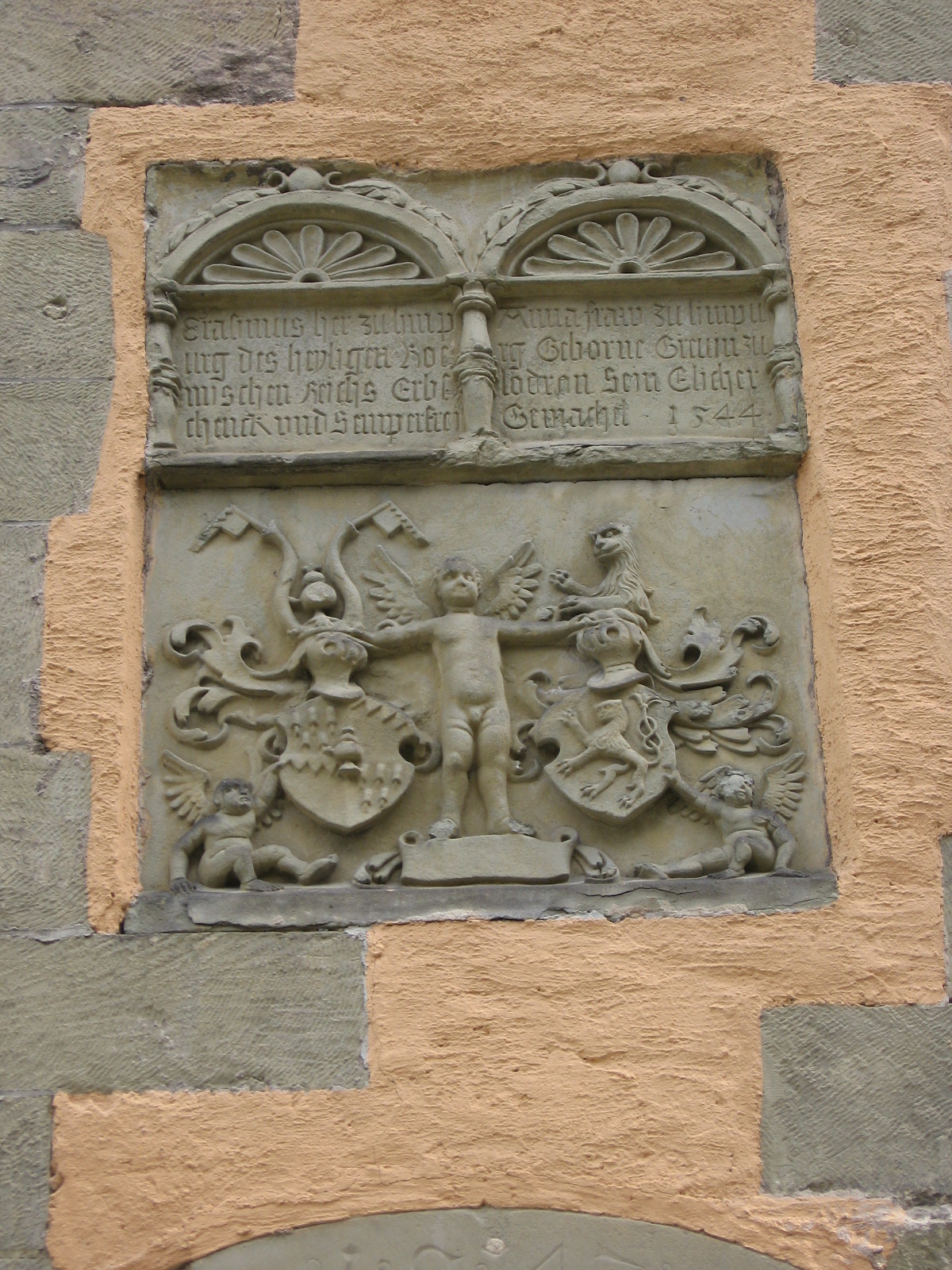 Schloss Obersontheim, Stiftertafel des Treppenturms vor dem Erasmusbau